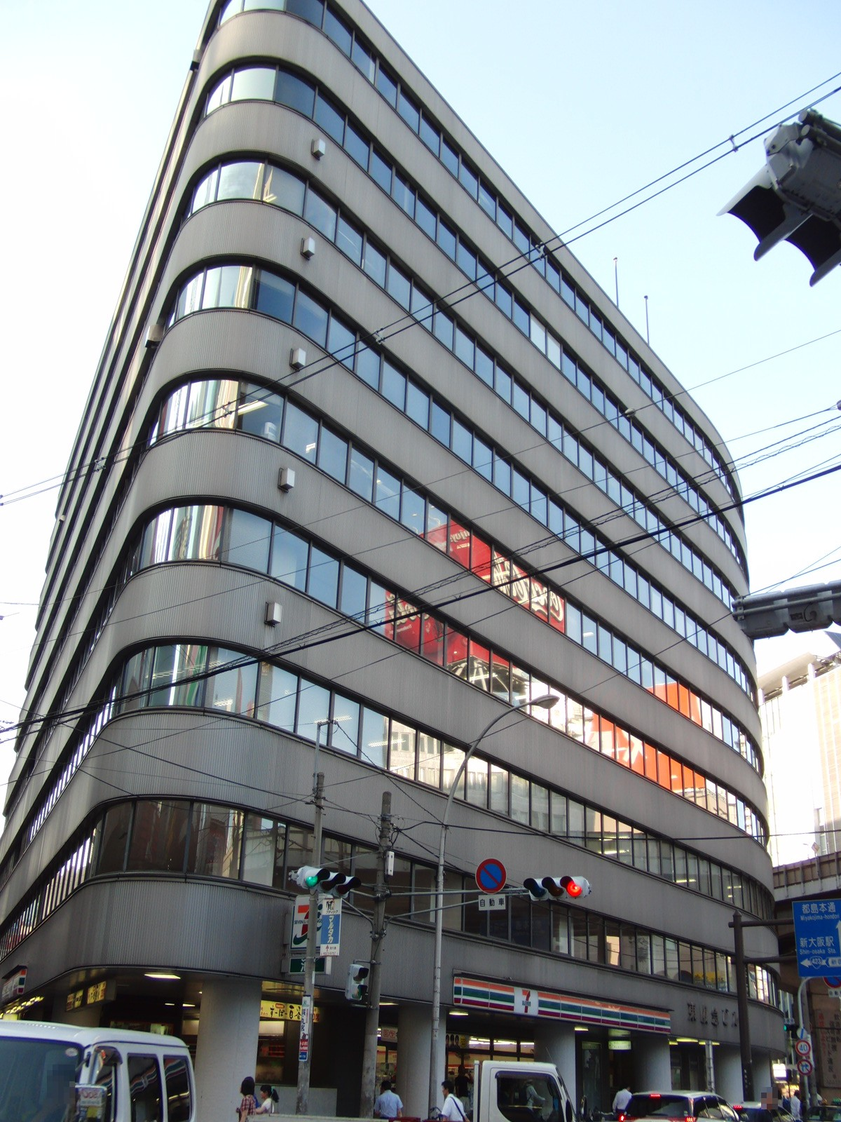 オーエス株式会社本社を撮影